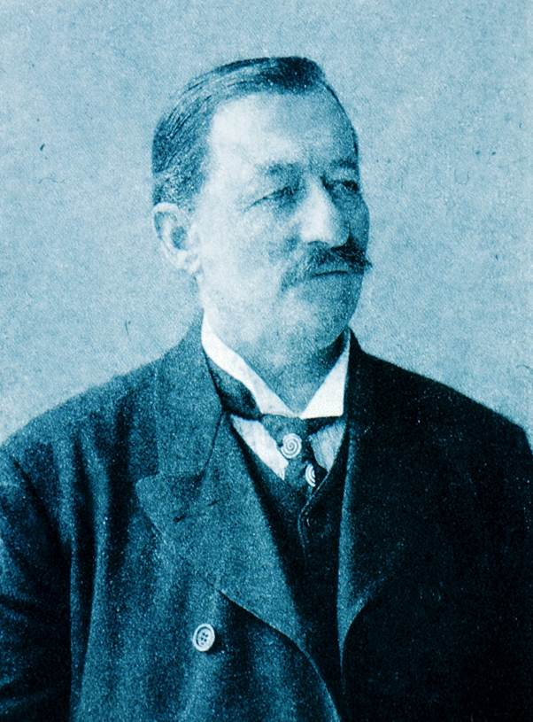 Bauingenieur, Archäologe und Templer: Gottlieb Schumacher. Foto: Schumacher Institut, Uni Haifa